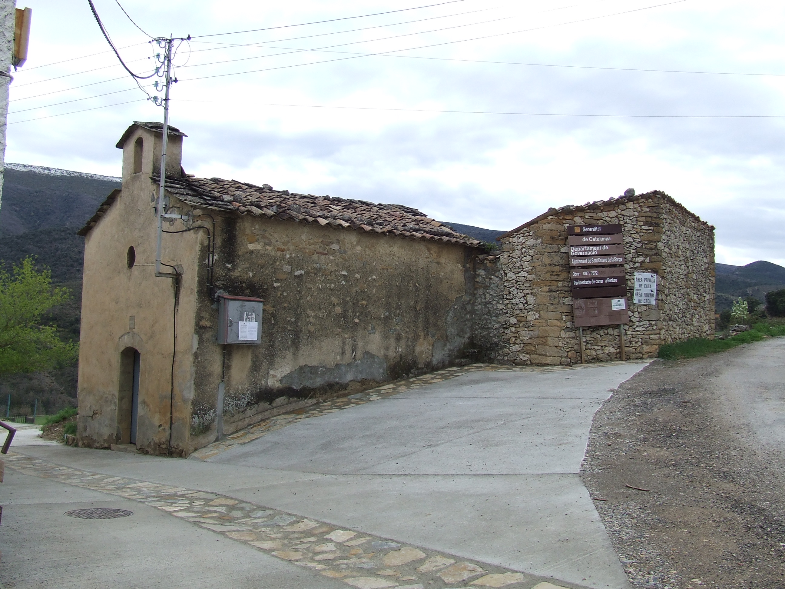 L'església de Beniure (Sant Esteve de la Sarga, Pallars Jussà)